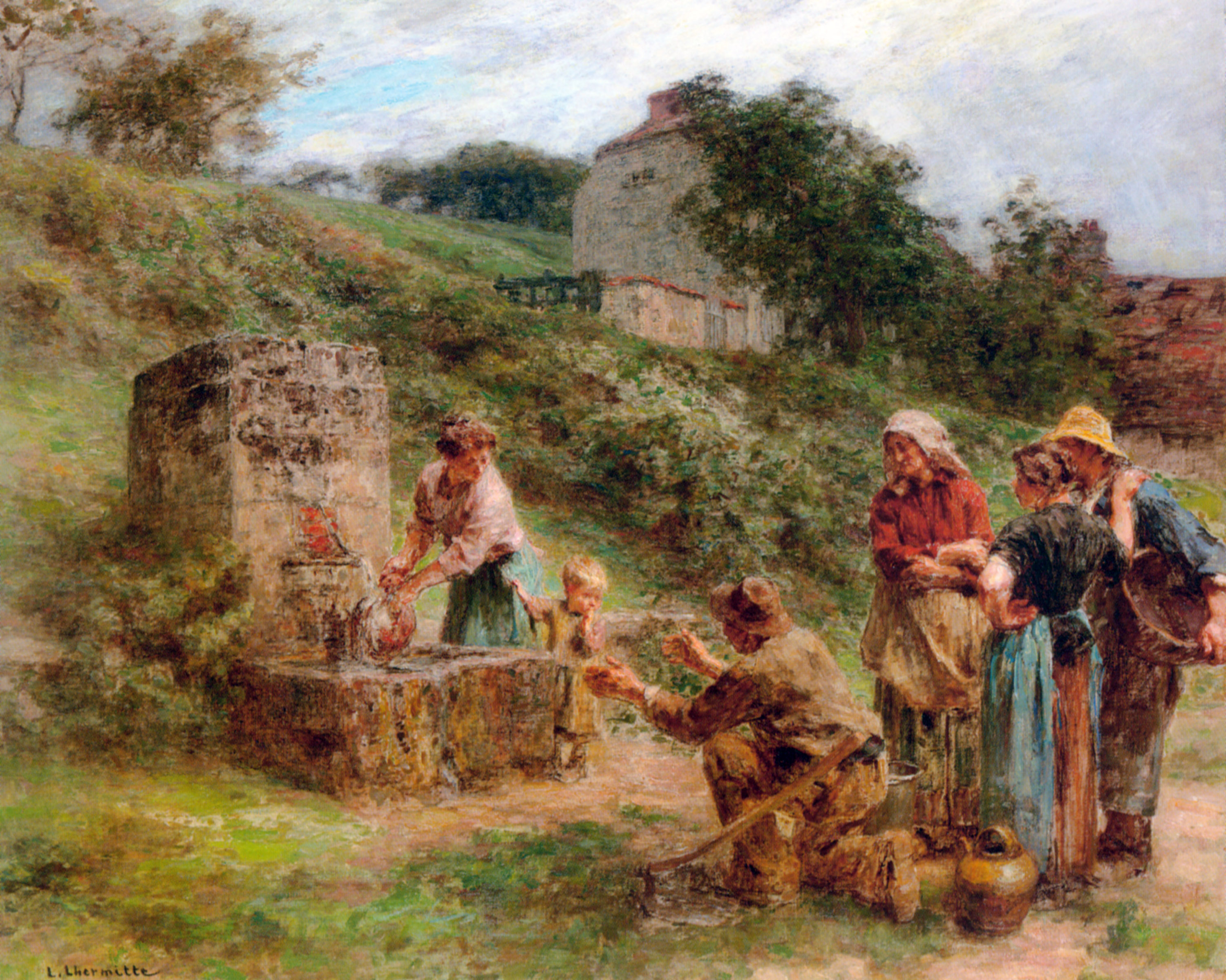 A la fontaine